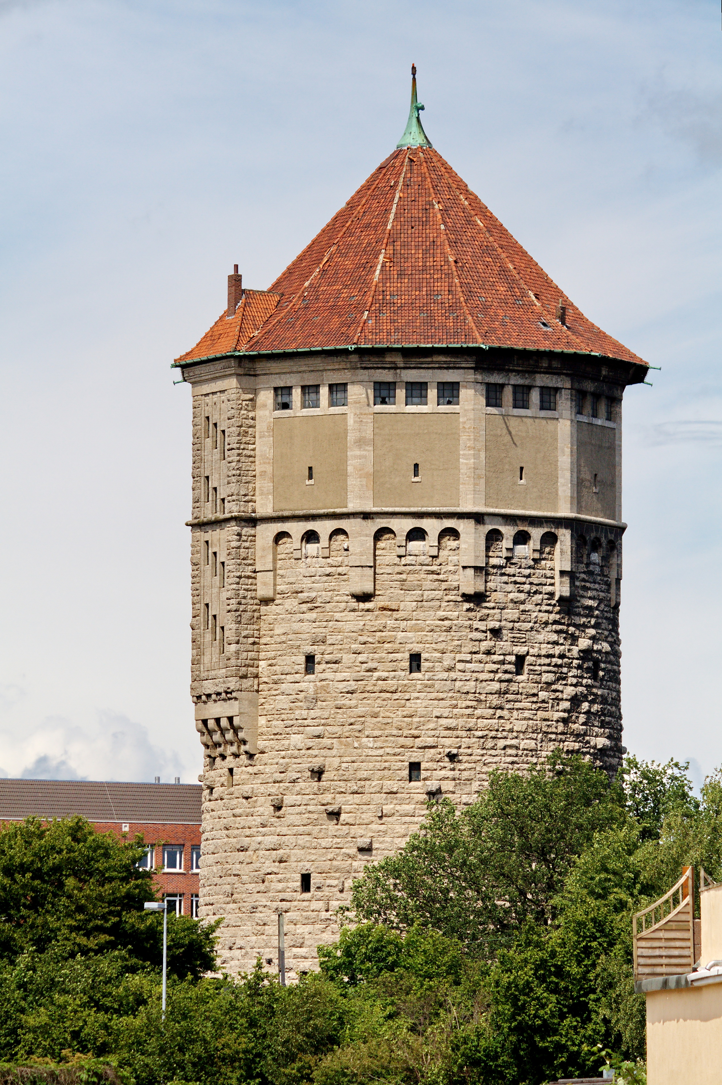 Wasserturm Brink-Hafen (Hannover), Niedersachsen, Deutschland